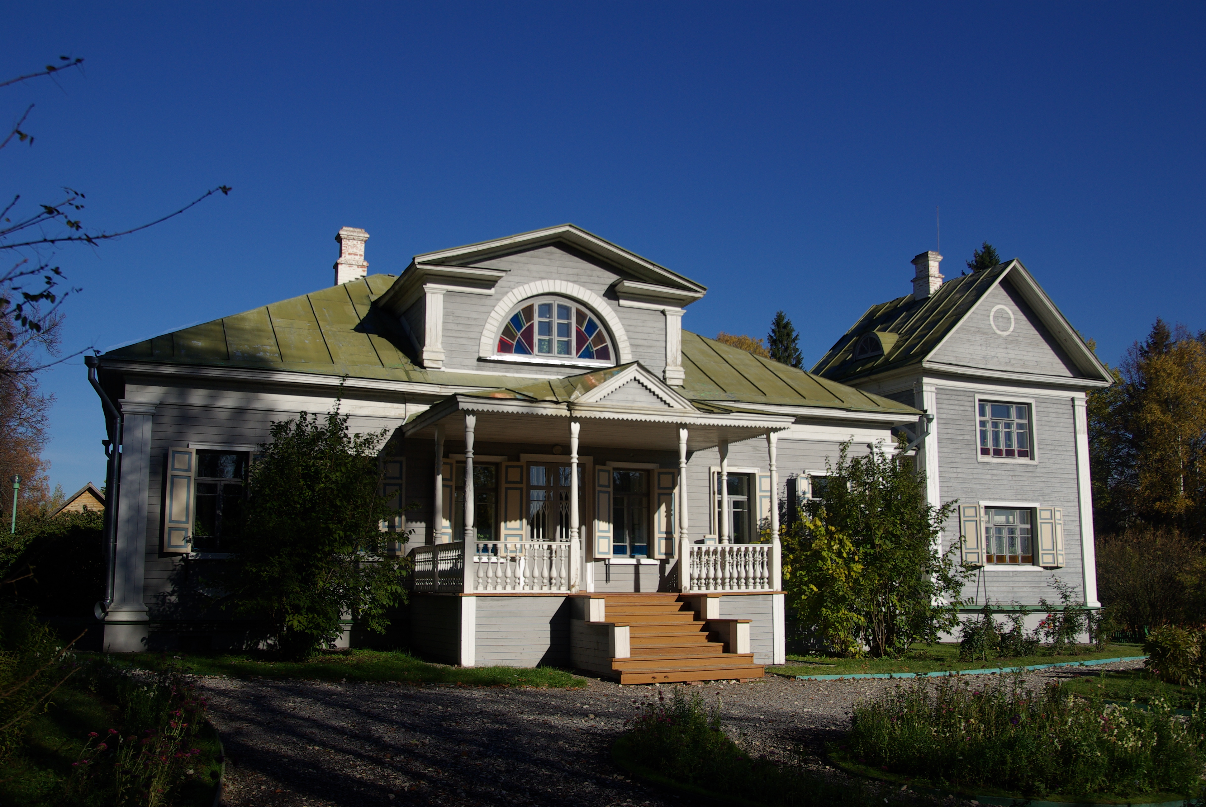 Усадьба А.А. Блока "Шахматово"